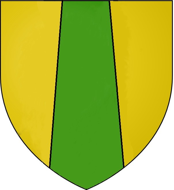 Blason du village d'Alairac (11290)